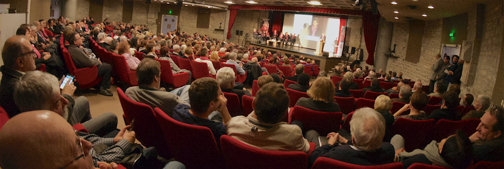 La tête de liste socialiste Marie-Guite Dufay présente au petit Kursaal de Besançon le 31 octobre 2015 son programme dans le cadre des élections régionales 2015 en Bourgogne Franche-Comté. Sur la scène se trouvent de gauche à droite Michel Neugnot, Maud Clavequin, Frédérique Colas, Jérôme Durain, Loïc Niepceron, Sylvain Mathieu, Sylvie Laroche, Denis Sommer et Marie-Guite Dufay.